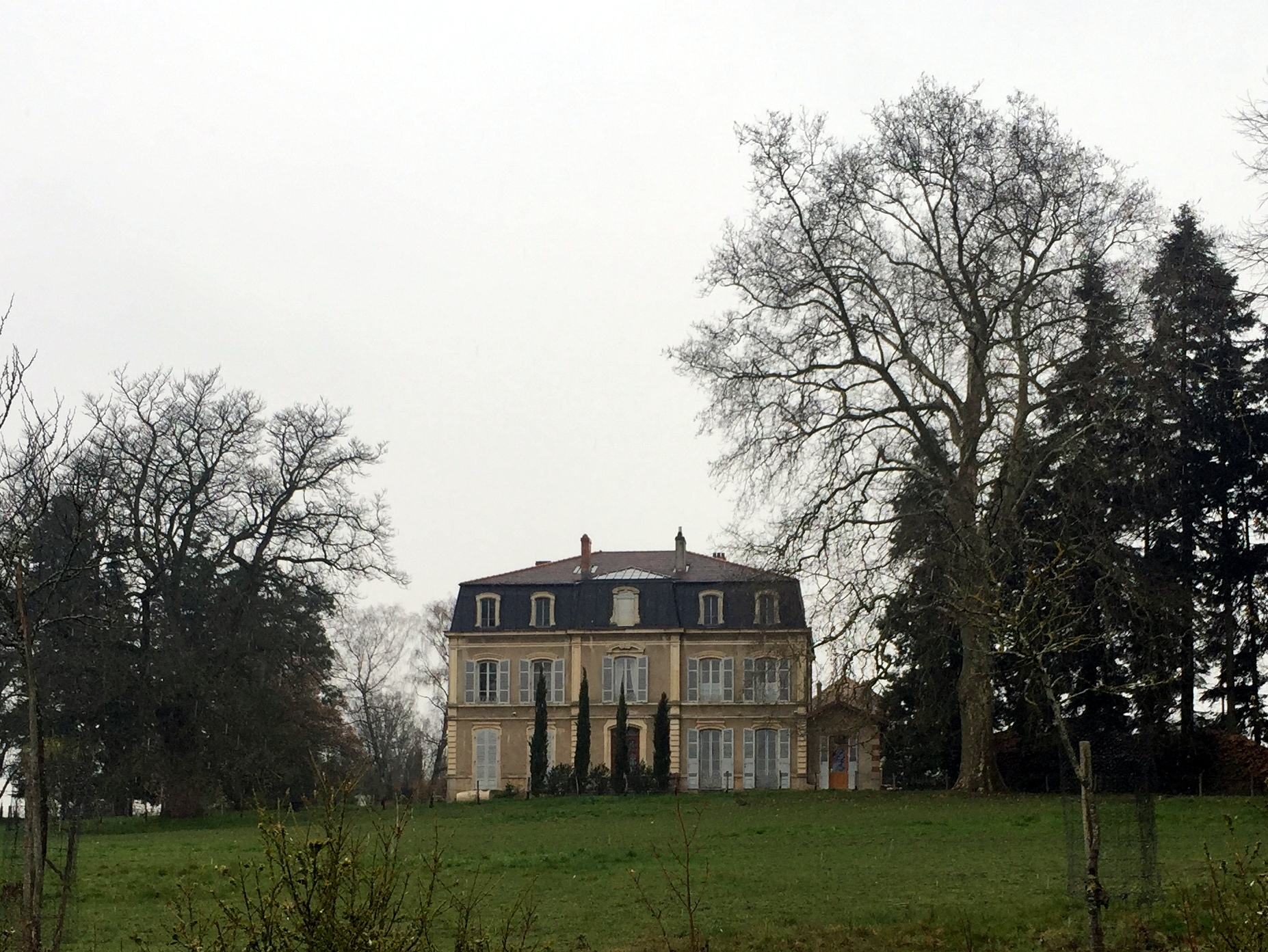 Image du hameau de Romanèche, commune de Montluel, Ain, France..